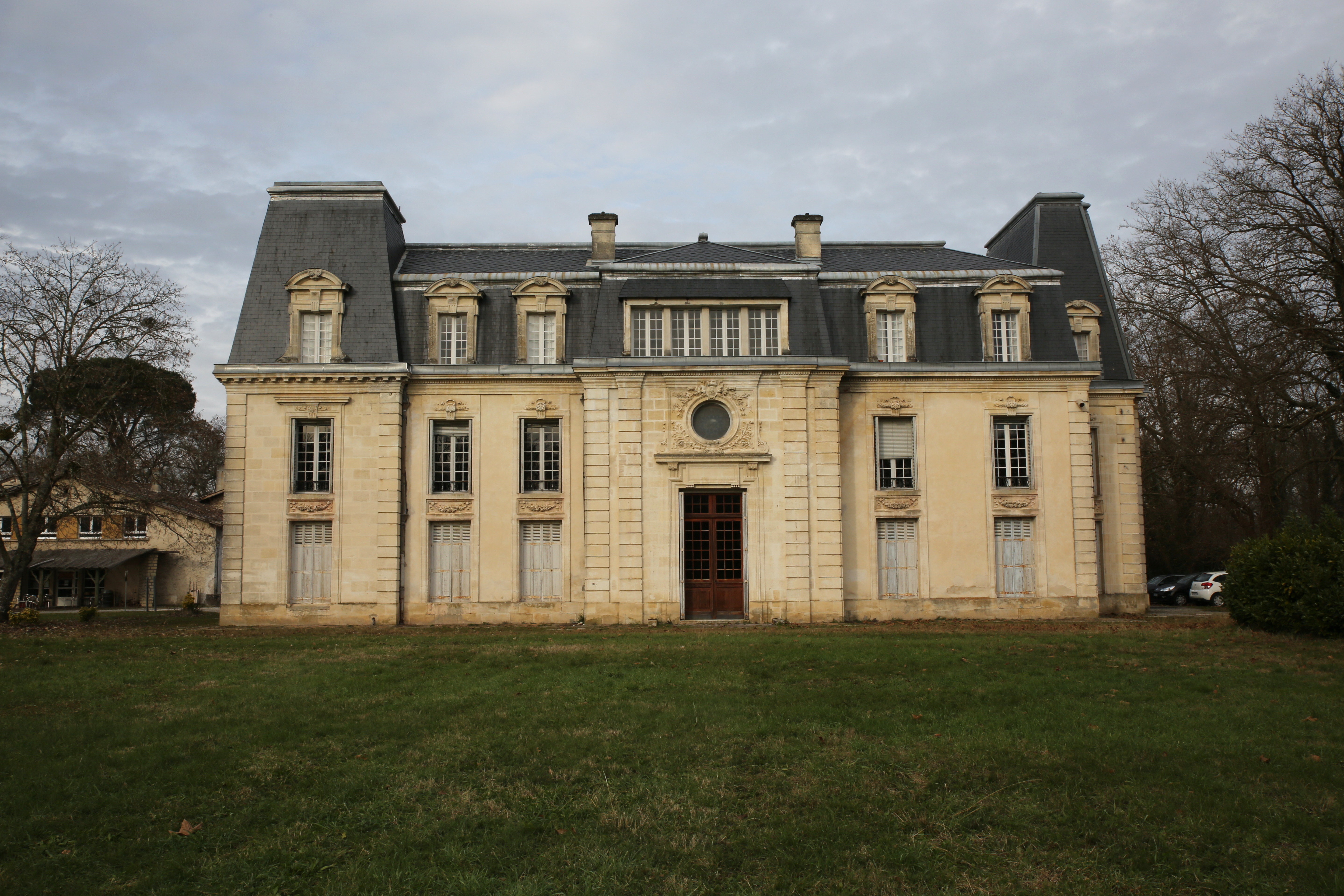 Château Montalier, Saint-Selve.